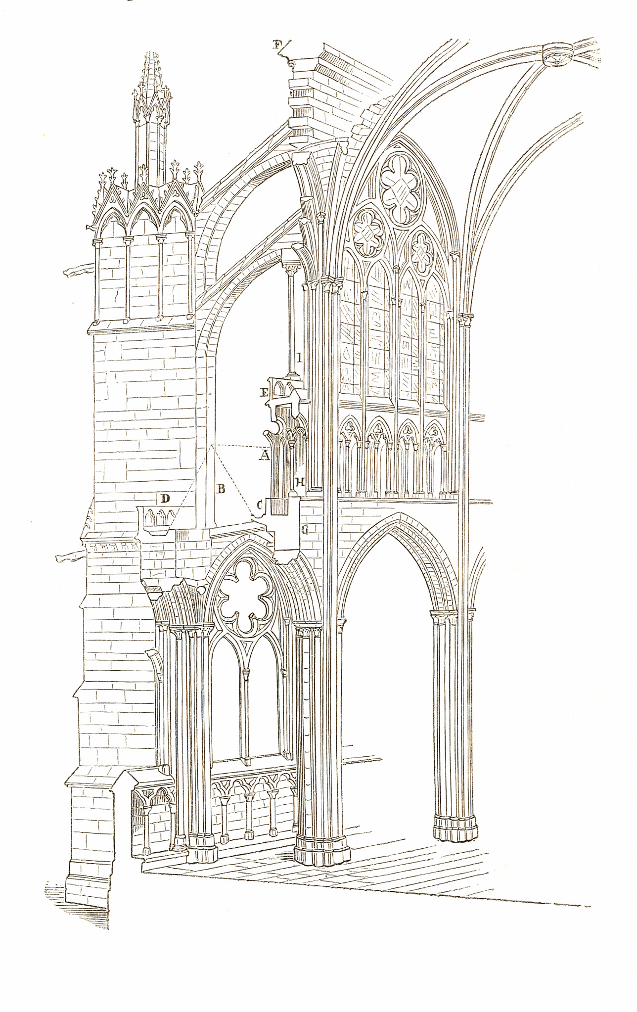 Zeichnung aus dem Jahrbuch der kaiserl. königl. Central-Commission zur Erforschung und Erhaltung der Baudenkmale III. 1859. 1-104. Zuordnung entsprechend Dateinamen August Essenwein (1831–1892) Alternative names August von Essenwein; August Ottmar von EssenweinDescriptionGerman architect and writerDate of birth/death 2 November 1831 13 October 1892Location of birth/death Karlsruhe NurembergAuthority control : Q105212 VIAF: 51804595 ISNI: 0000 0001 1062 3760 ULAN: 500014044 LCCN: n86016586 Open Library: OL2309247A WorldCat creator QS:P170,Q105212 Scanprojekt Bundesdenkmalamt Österreich This scan or this PDF-file was created within the Austrian Wikipedia-project Denkmalpflege Österreich (German only) supported by Wikimedia Germany and Wikimedia Austria as part of the Wikipedia community-project to collect public domain documents from the library of the Heritage Monuments Board of Austria. This document describes or depicts an object which is located in France today. Send requests for uncompressed scans to Hubertl. This work is in the public domain in its country of origin and other countries and areas where the copyright term is the author's life plus 100 years or less. You must also include a United States public domain tag to indicate why this work is in the public domain in the United States. This file has been identified as being free of known restrictions under copyright law, including all related and neighboring rights. .